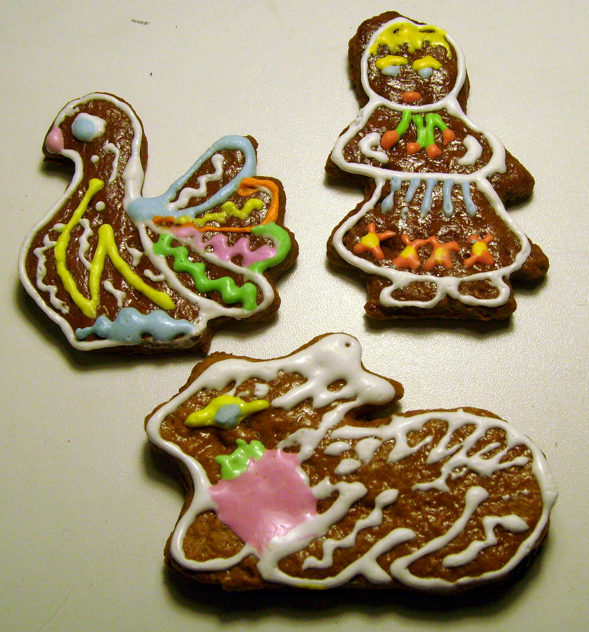 Козули